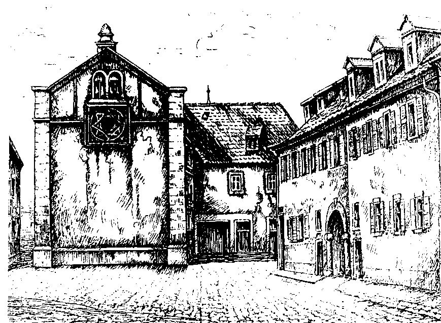 Alte Synagoge in Bad Kissingen von 1852 in der Bachstraße; Abriss 1927/1928